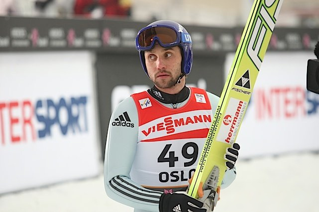 Pawieł Karielin podczas serii kwalifikacyjnej przed konkursem indywidualnym mężczyzn na skoczni normalnej na Mistrzostwach Świata w Narciarstwie Klasycznym 2011 w Oslo.